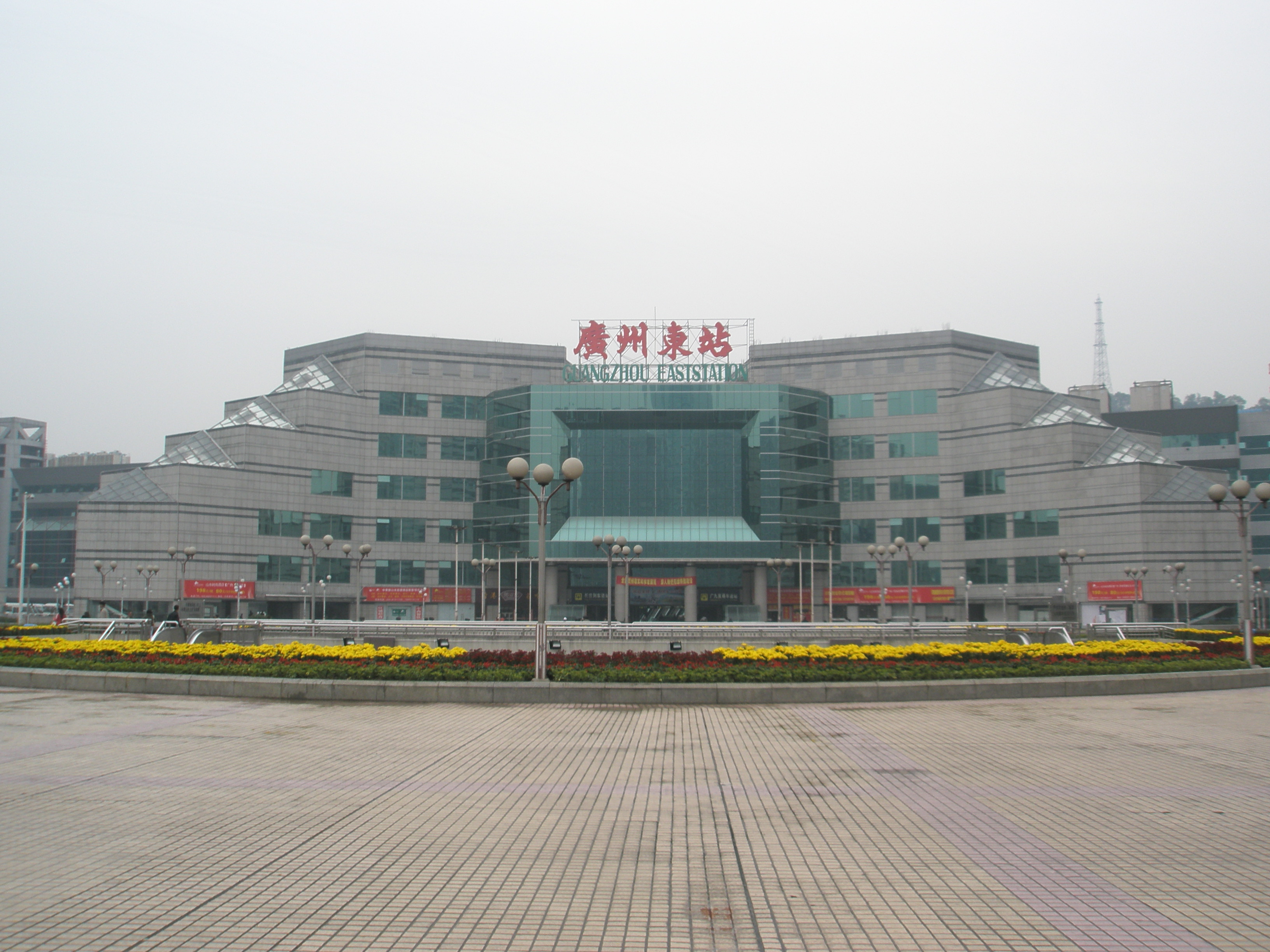 东站近眺